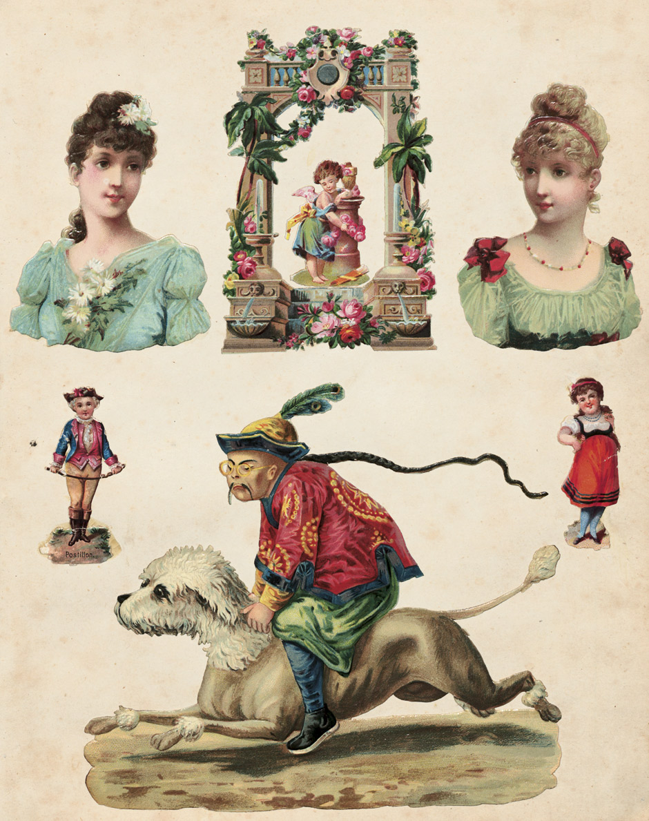 Blatt aus: Oblaten-Album mit Deckelschild "Hanchen Weise". (Um 1890).